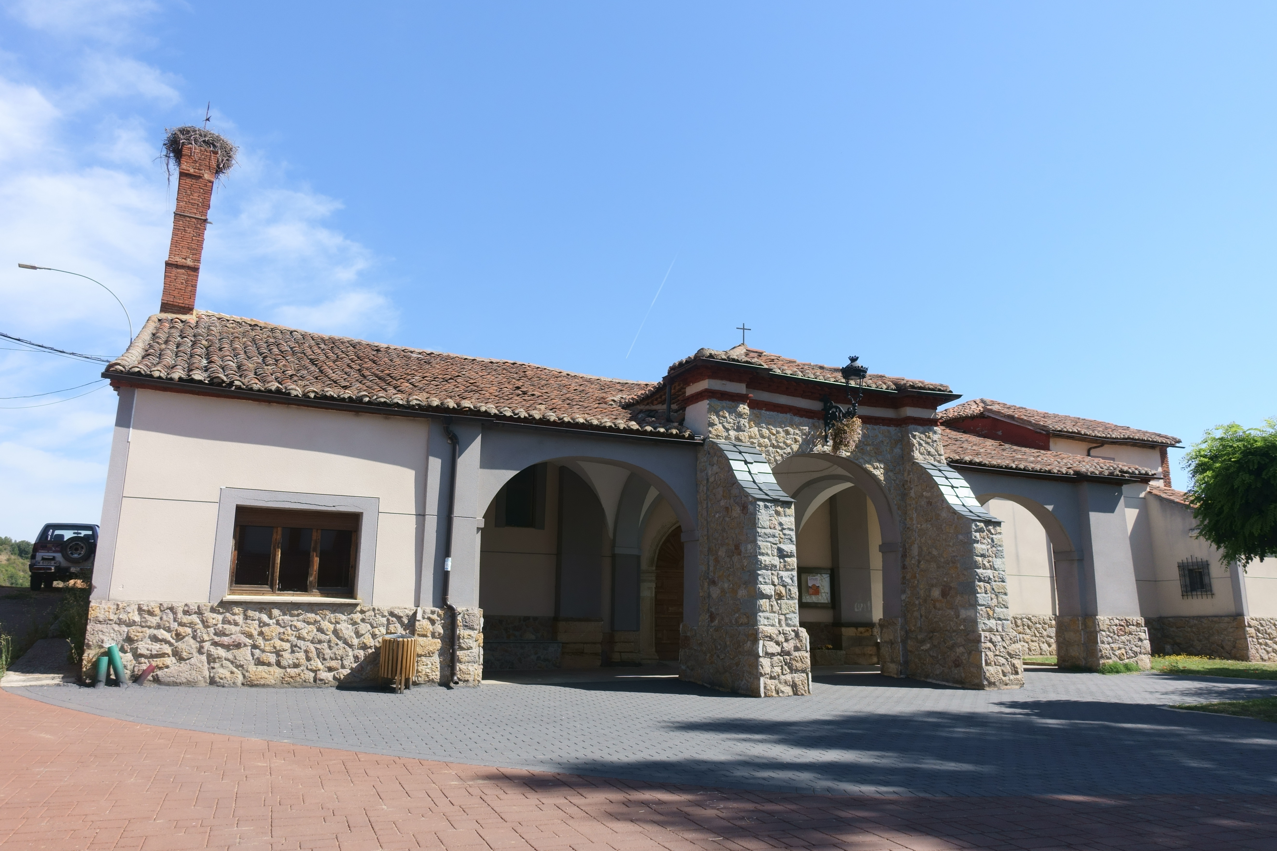 Iglesia de Santa Marina, Almanza (León, España).